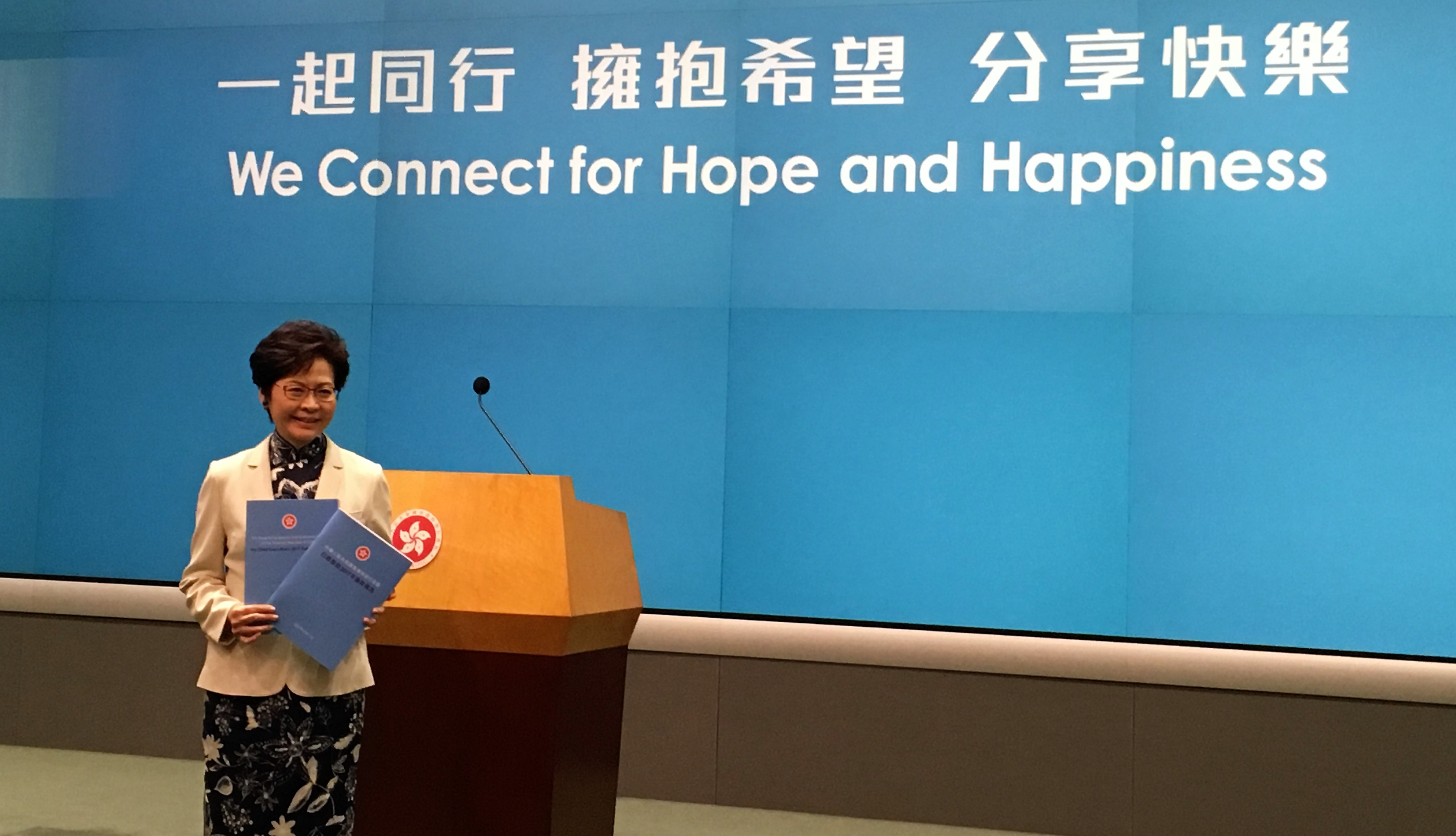 中文（香港）: 香港特首林鄭月娥出席首份施政報告記者會